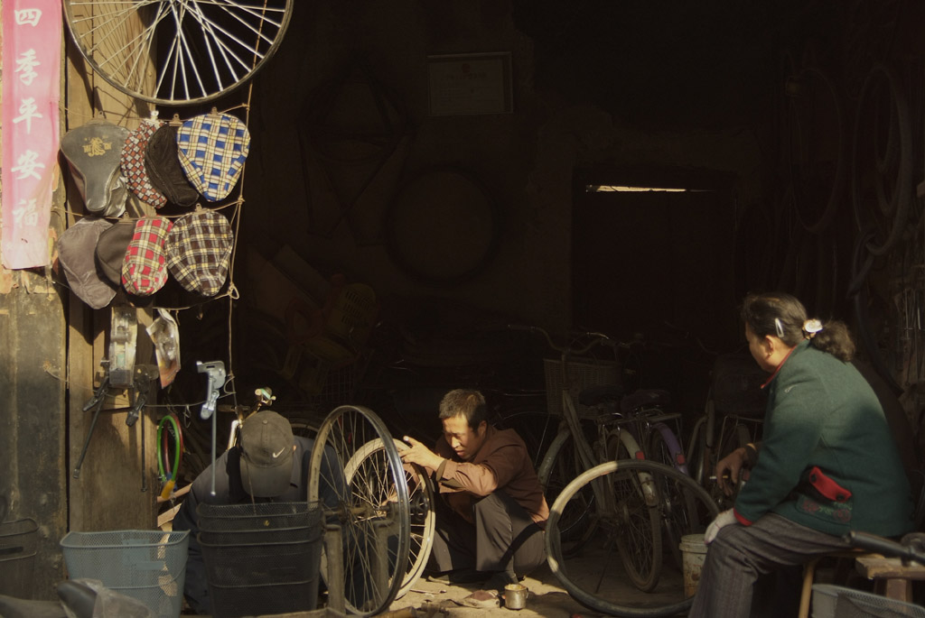 自行车修车铺